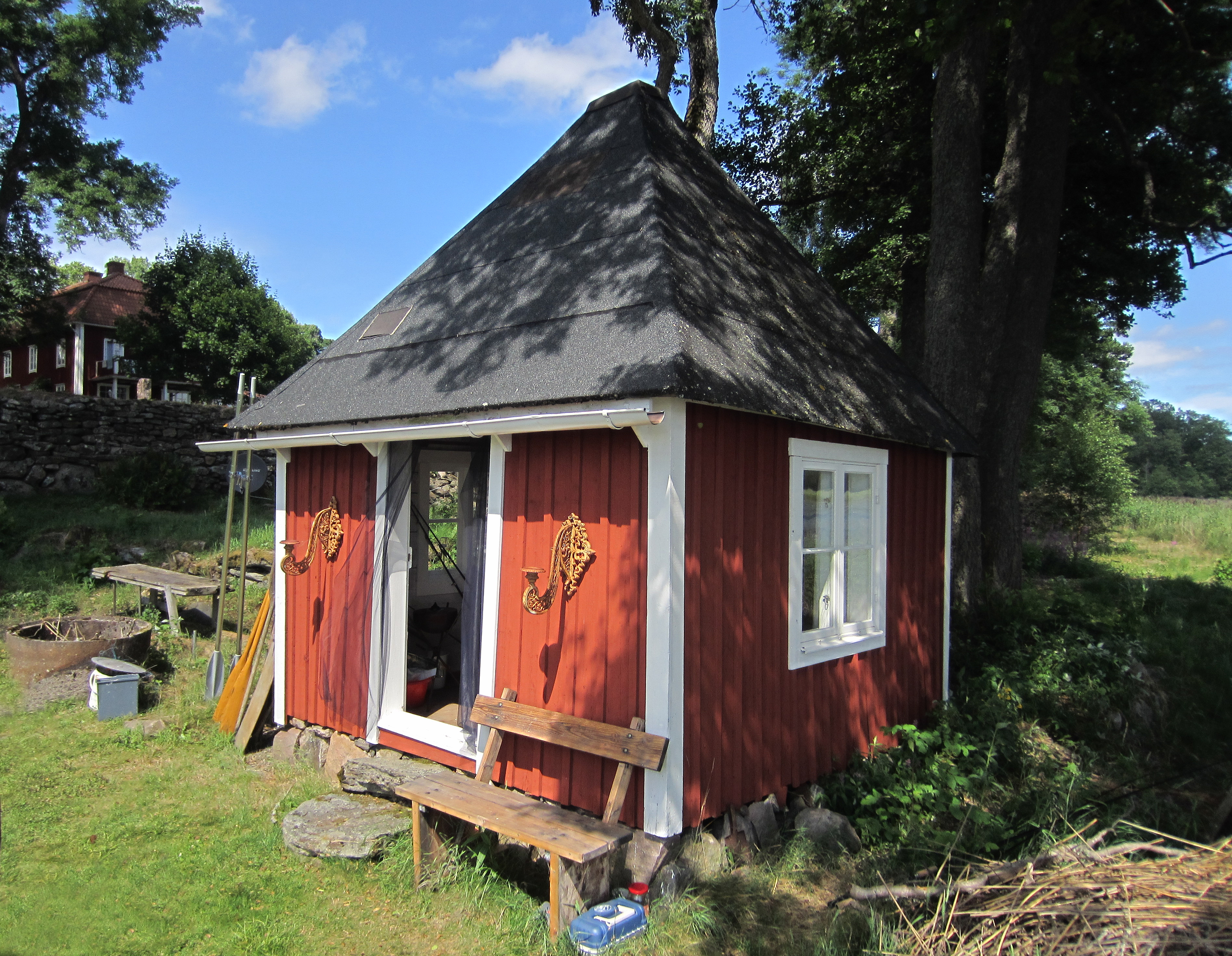 Toftanäs säteri, Bolmsö socken, Sverige.